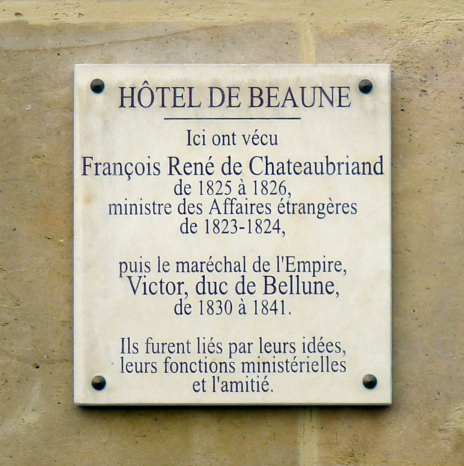 Rue du Regard (n°7 : hôtel de Beaune, plaque) - Paris VI .